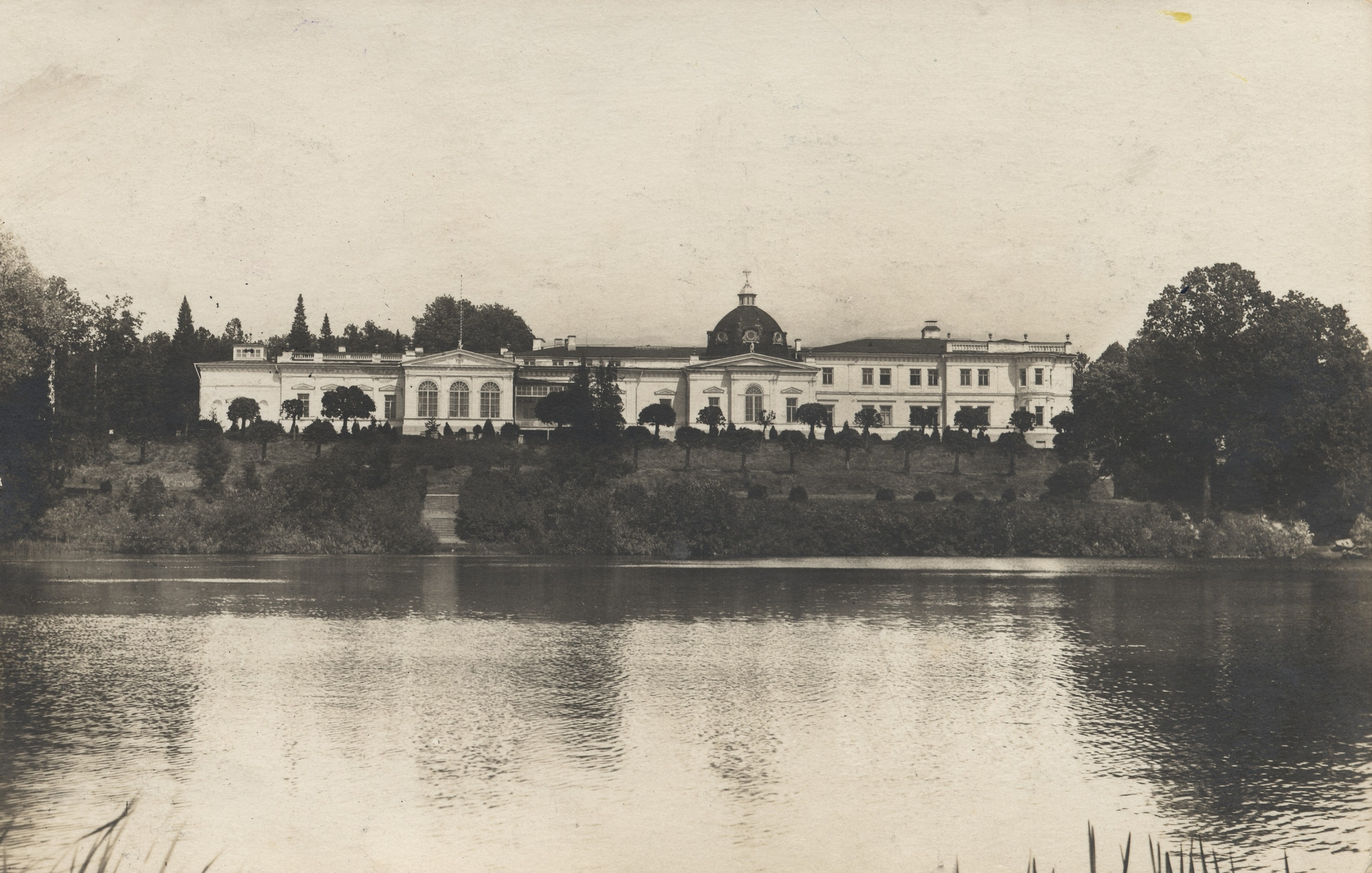 Tartu Rahvusmuuseum Raadi mõisas